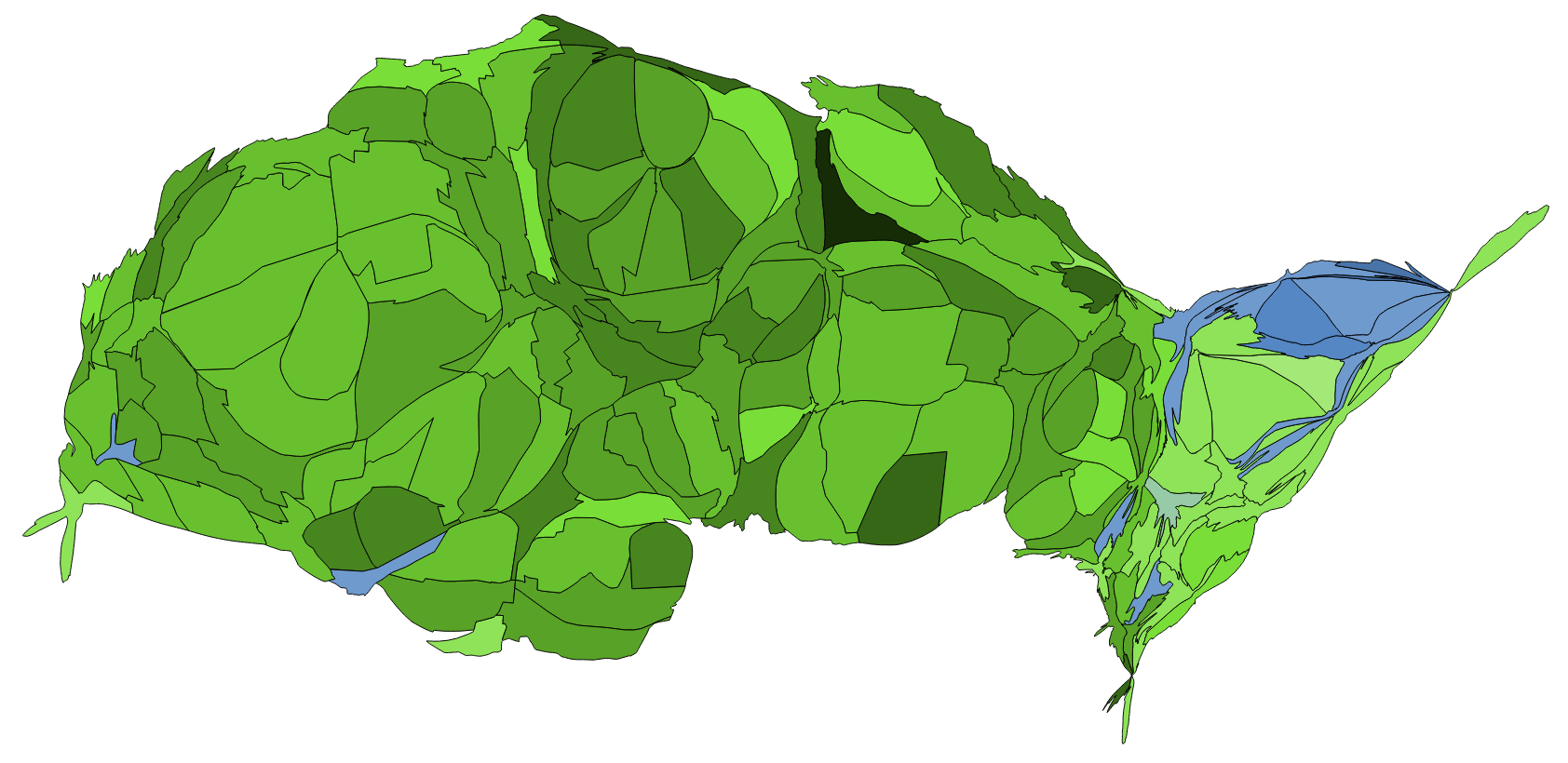 顏色對照表